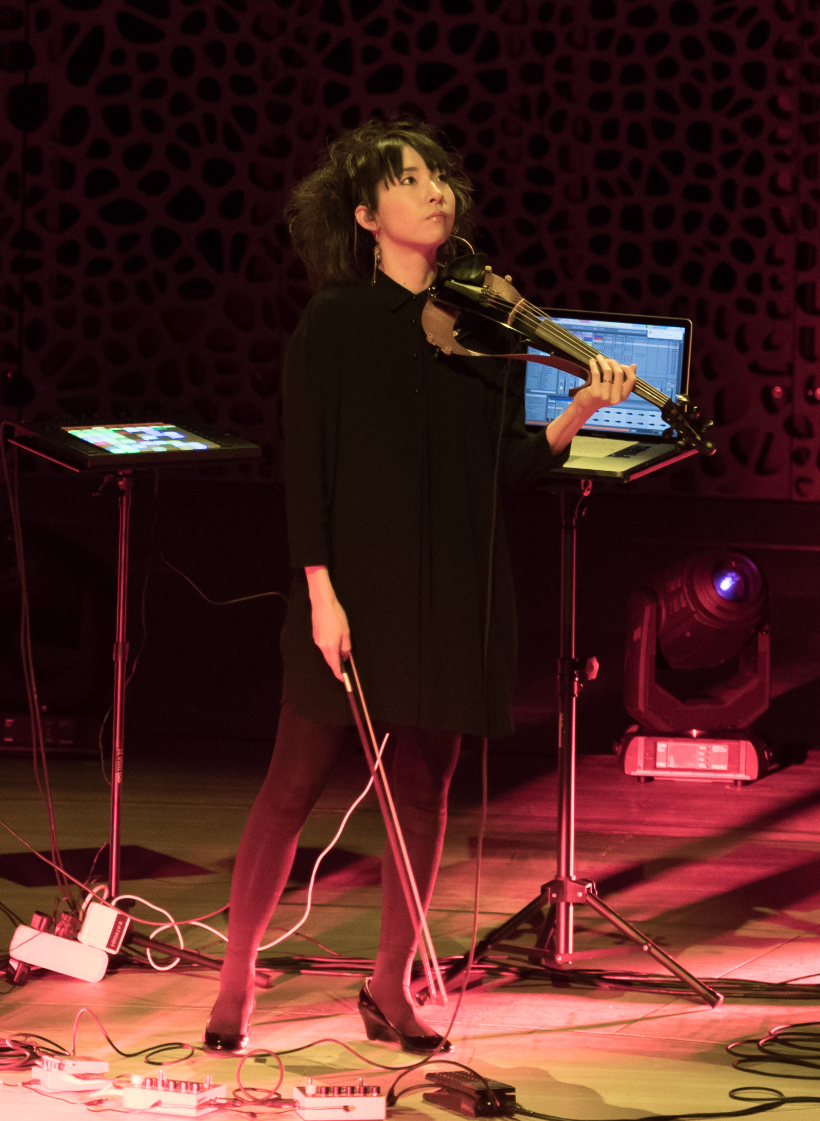 Tangerine Dream bei der Quantum of Electronic Evolution Tour in der Elbphilharmonie Hamburg 2018